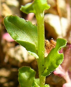 Legousia hybrida